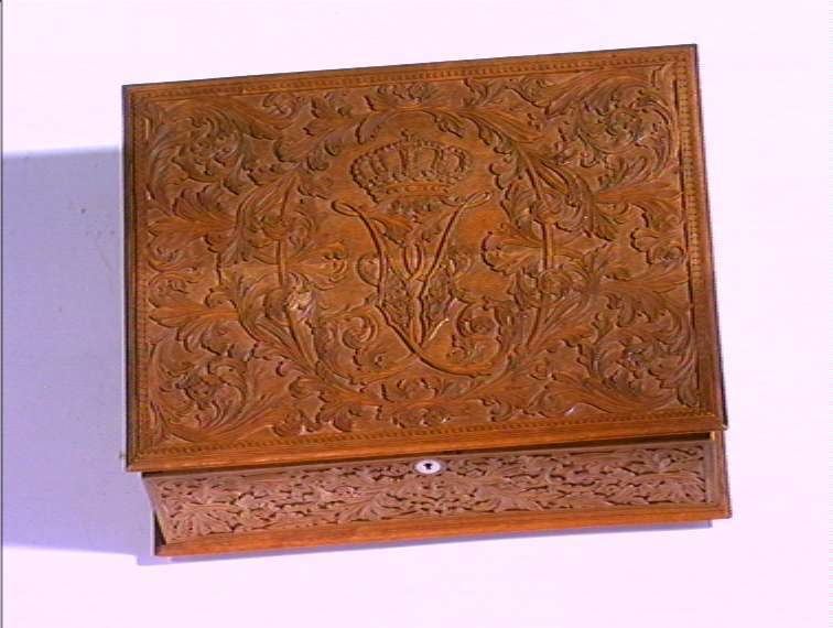 Skrin med J i speilmonogram, skåret av Ole Moene for dronning Josephine. Lengde 28 cm. Skrinet kommer fra Bernadottesamlingen og er nå på Norsk Folkemuseum. Foto Anne-Lise Reinsfelt/Norsk Folkemuseum, NF.1915-0275.